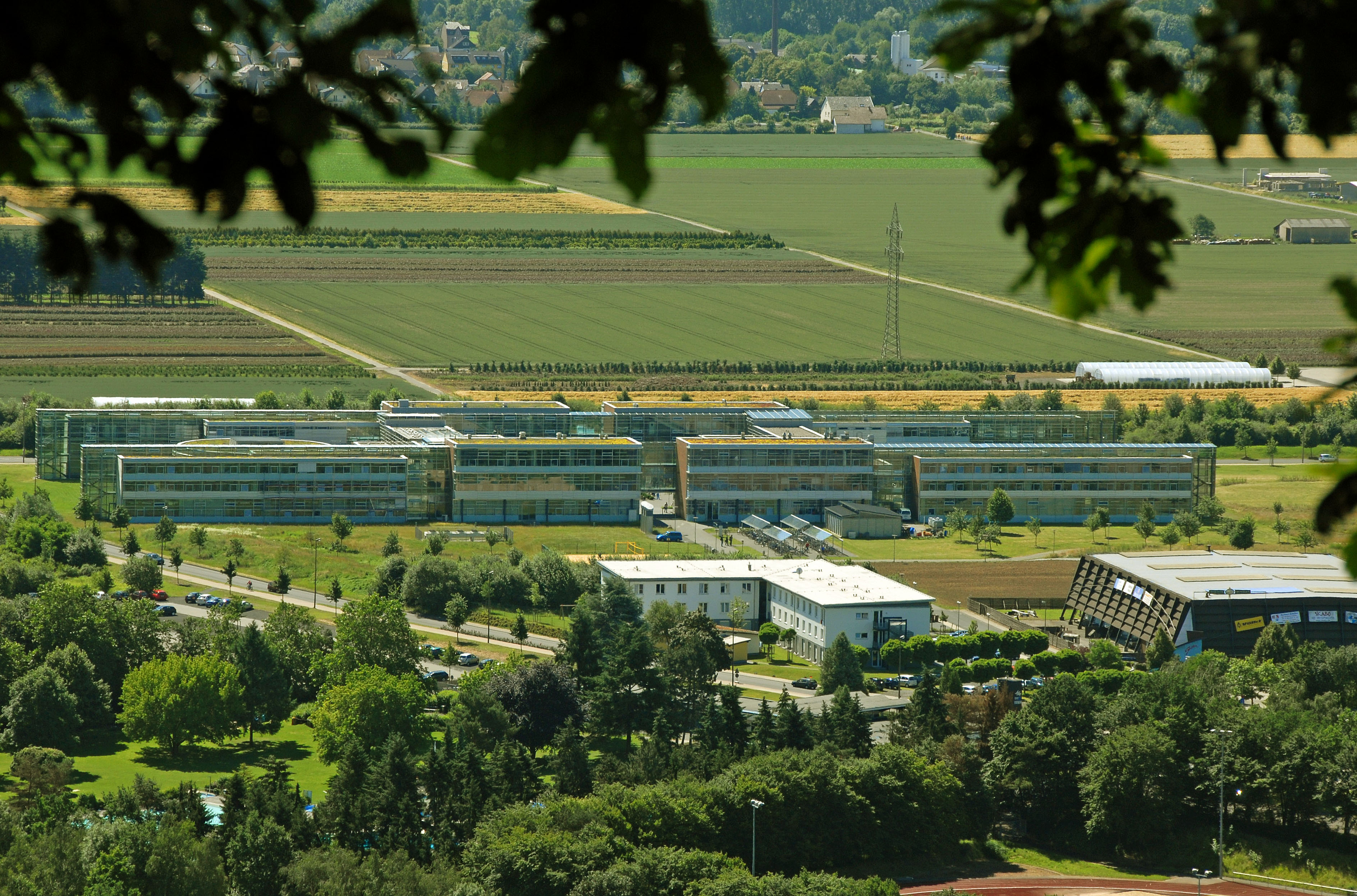 Der RheinAhrCampus von oben. Zu sehen sind auch das Studentenwohnheim, Beachvolleyballplatz, Tennishalle sowie ein Teil des Freibad und des Sportplatz Remagen.